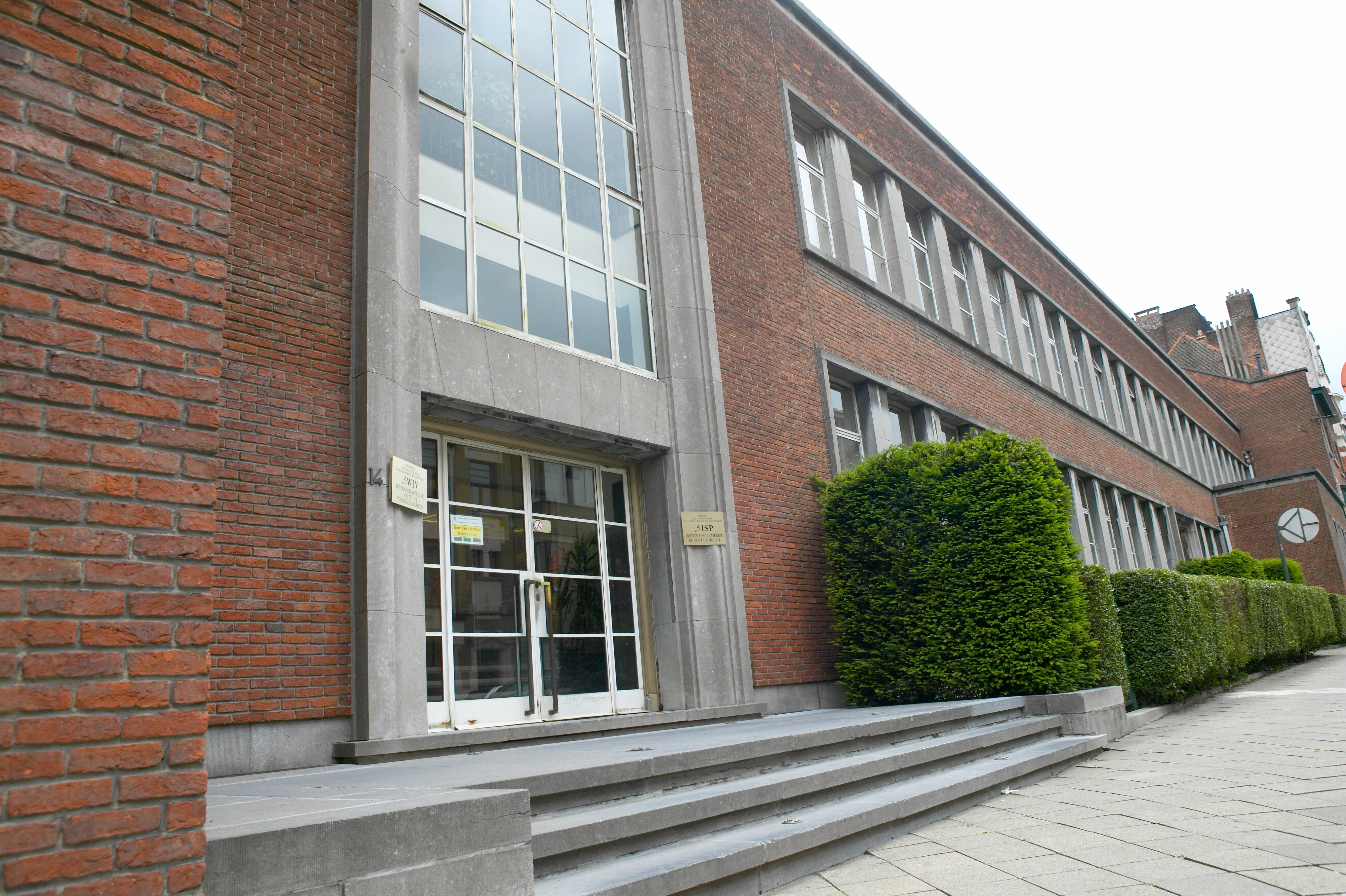 Hoofdzetel, Site Elsene